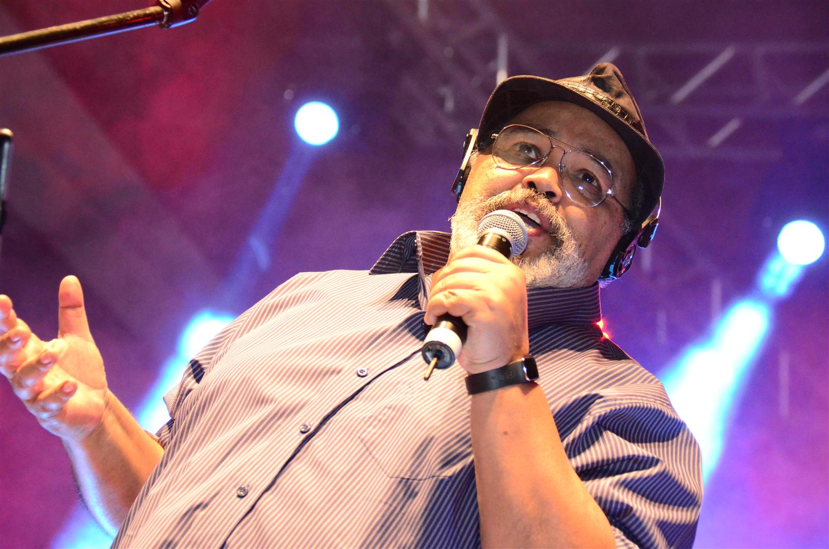 Foto: André Luiz D. Takahashi